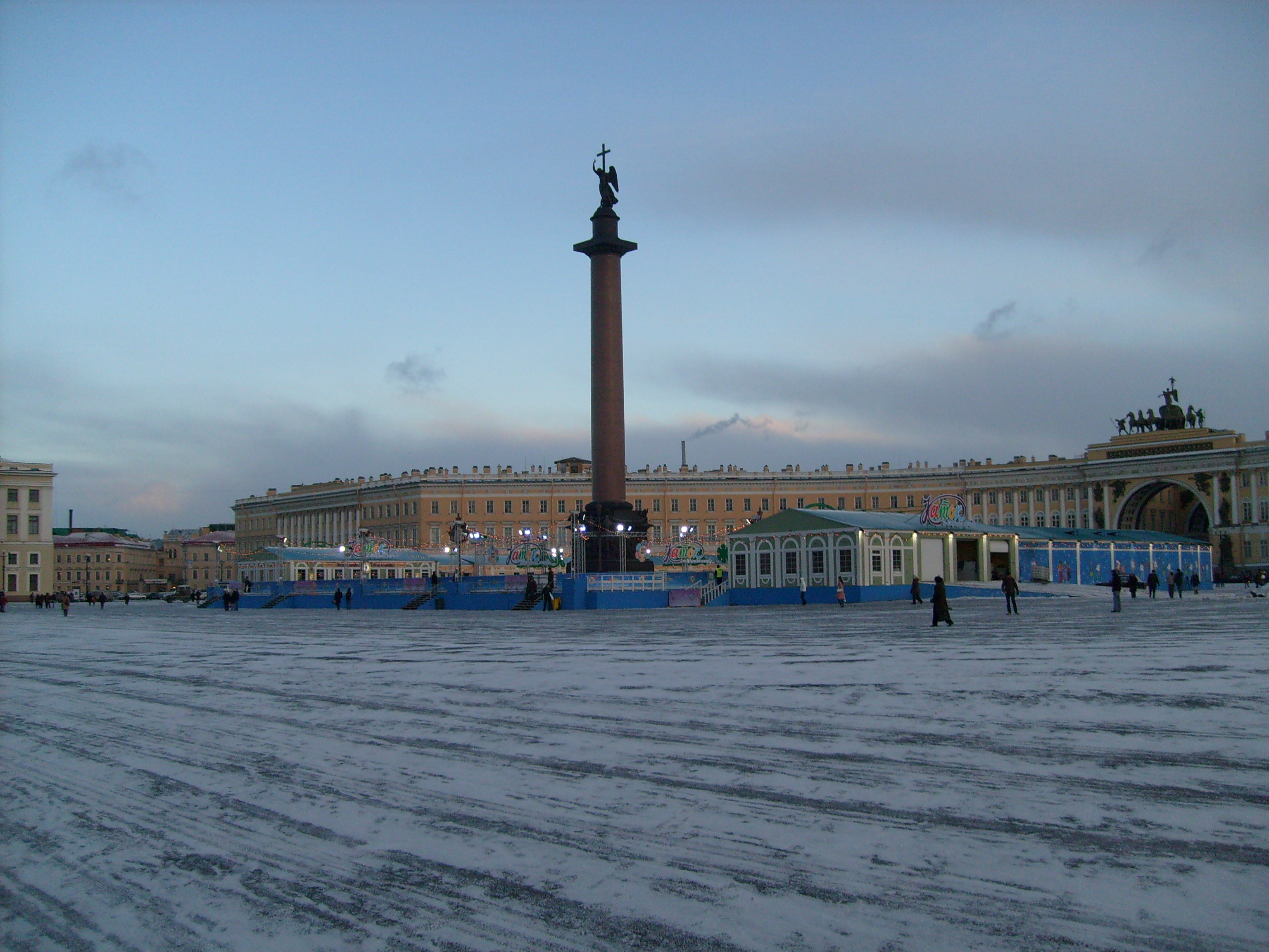 Каток на Дворцовой площади Петербурга, февраль 2008